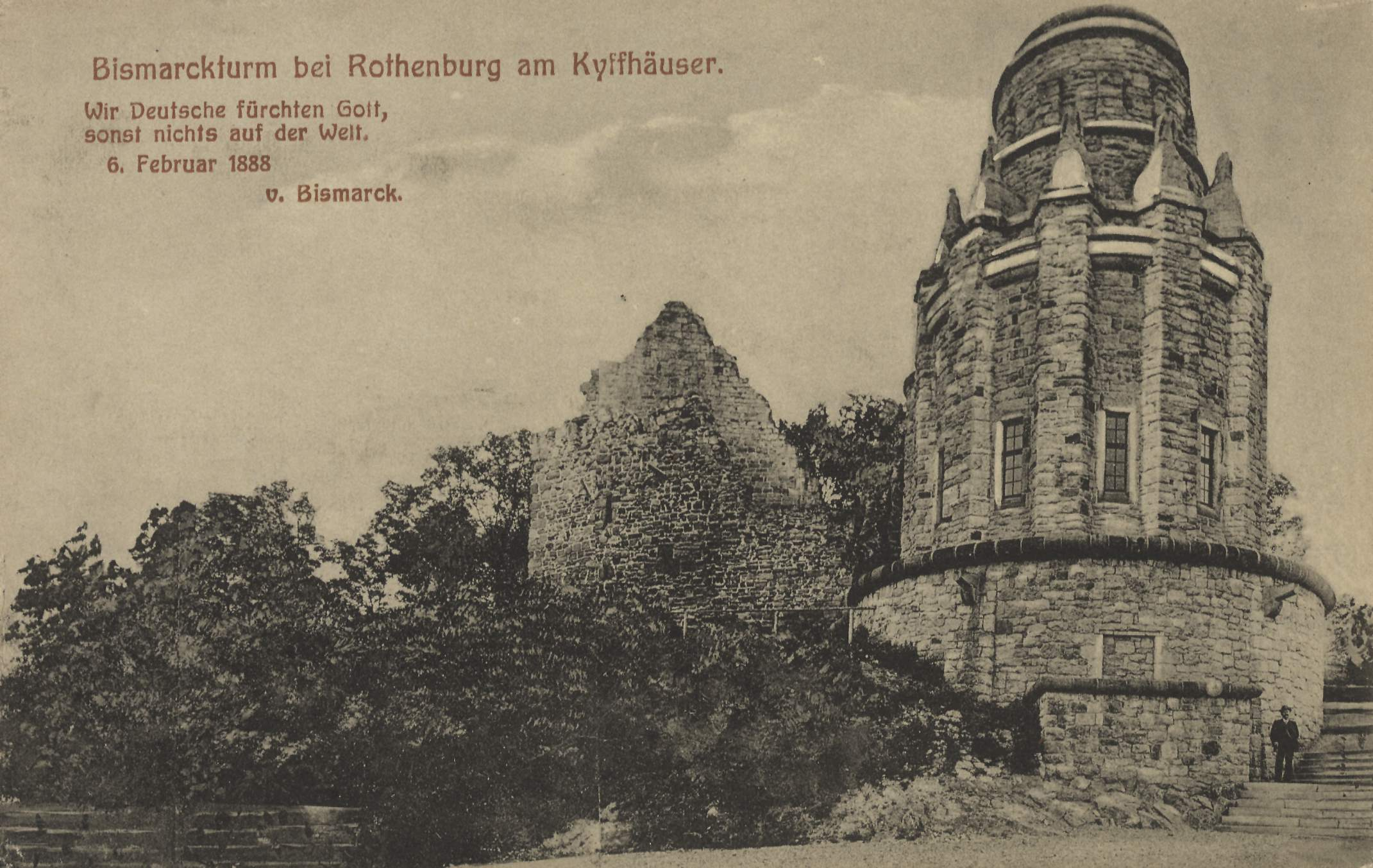 Das Bismarckdenkmal auf der Rothenburg/Kyffh. um 1910